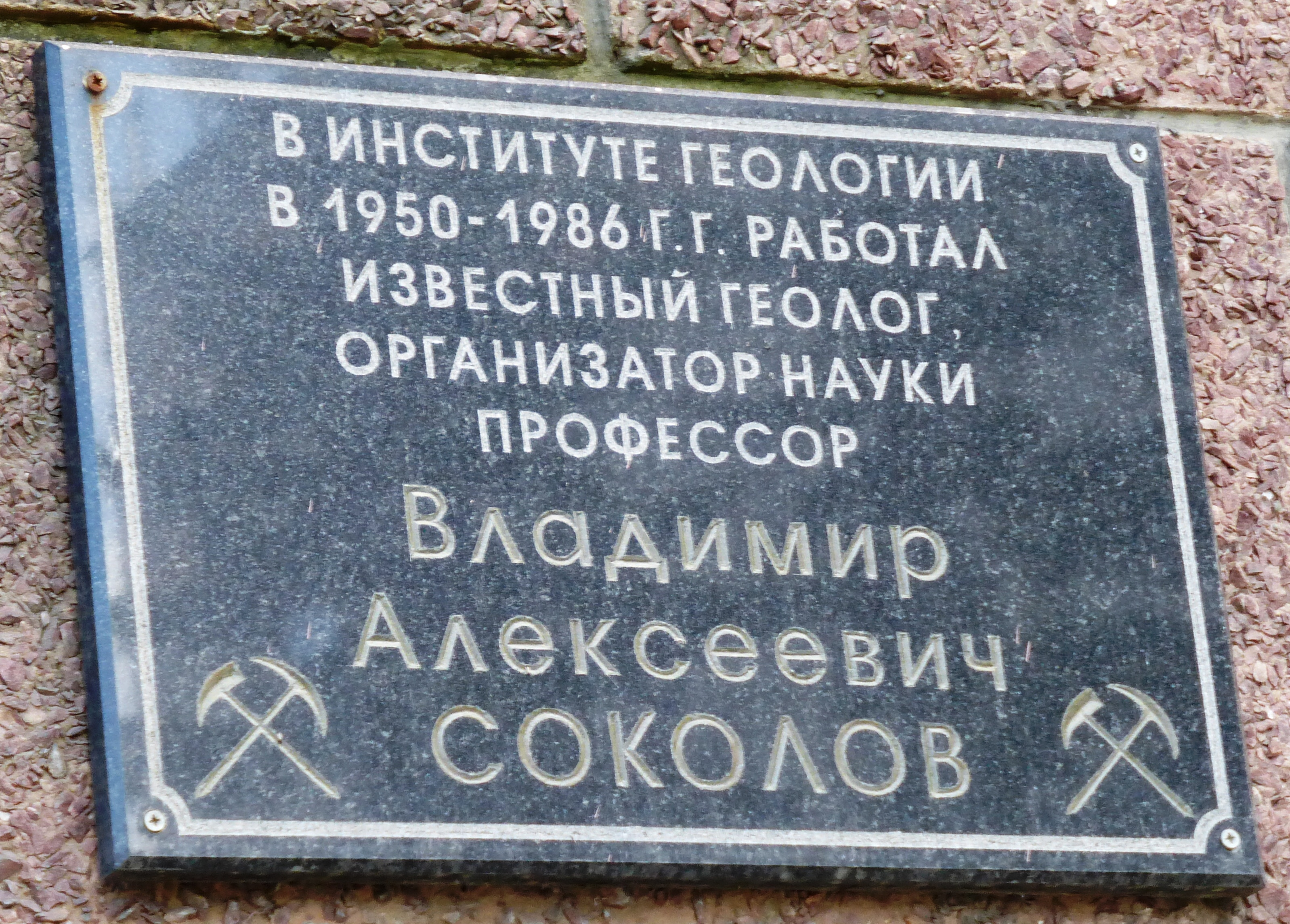 Мемориальная доска на здании Карельского научного центра РАН в Петрозаводске на ул.Пушкинской